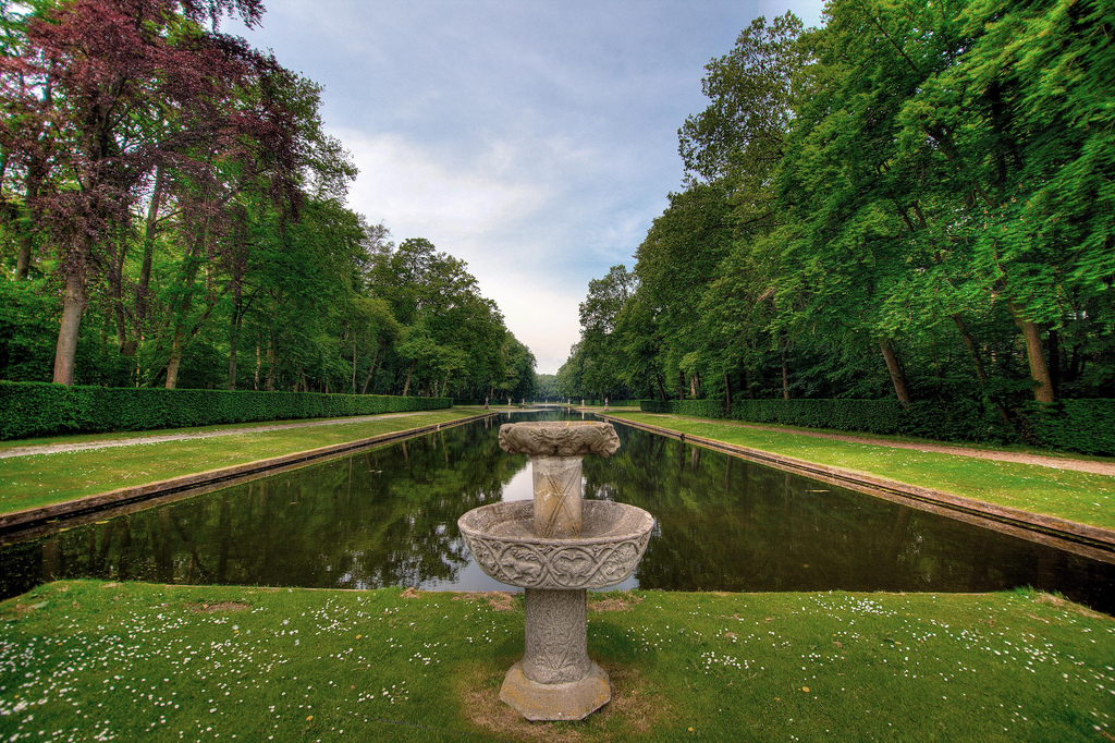 De Haar. KASTEELCOMPLEX, in oorsprong 15e eeuw, na in de 18e eeuw tot ruine verwaarloosd te zijn op grandioze wijze door Cuypers in 1892 in franse smaak herbouwd. HOOFDGEBOUW met KERK, VOORBURCHTEN en DIENSTWONINGEN, waterwerken en kademuren en quasi versterkingen, beide luchtbruggen in het park, hekken. Delen van het hoofdgebouw resten van het middeleeuwse slot.